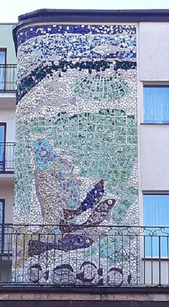 Mozaika na ścianie frontowej "Domu Rybaka" w Kołobrzegu ul. Wylotowa 7 autorstwa Olgierda Szerląga. Data powstania ok. 1968r., zniszczona podczas rozbiórki budynku w 2020 roku